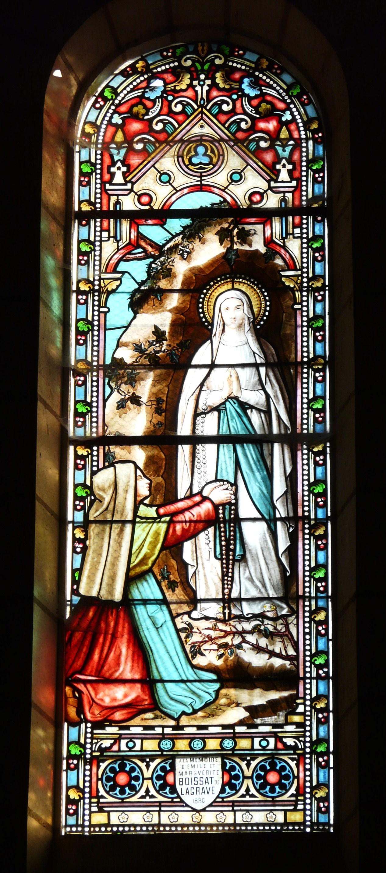 Vitrail représentant l'apparition de la Vierge Marie à Bernadette Soubirous, église Saint-Pierre-ès-Liens, Bourdeilles, Dordogne, France. Don de la famille Boissat de Lagrave (branche aînée des Boissat de Mazerat).